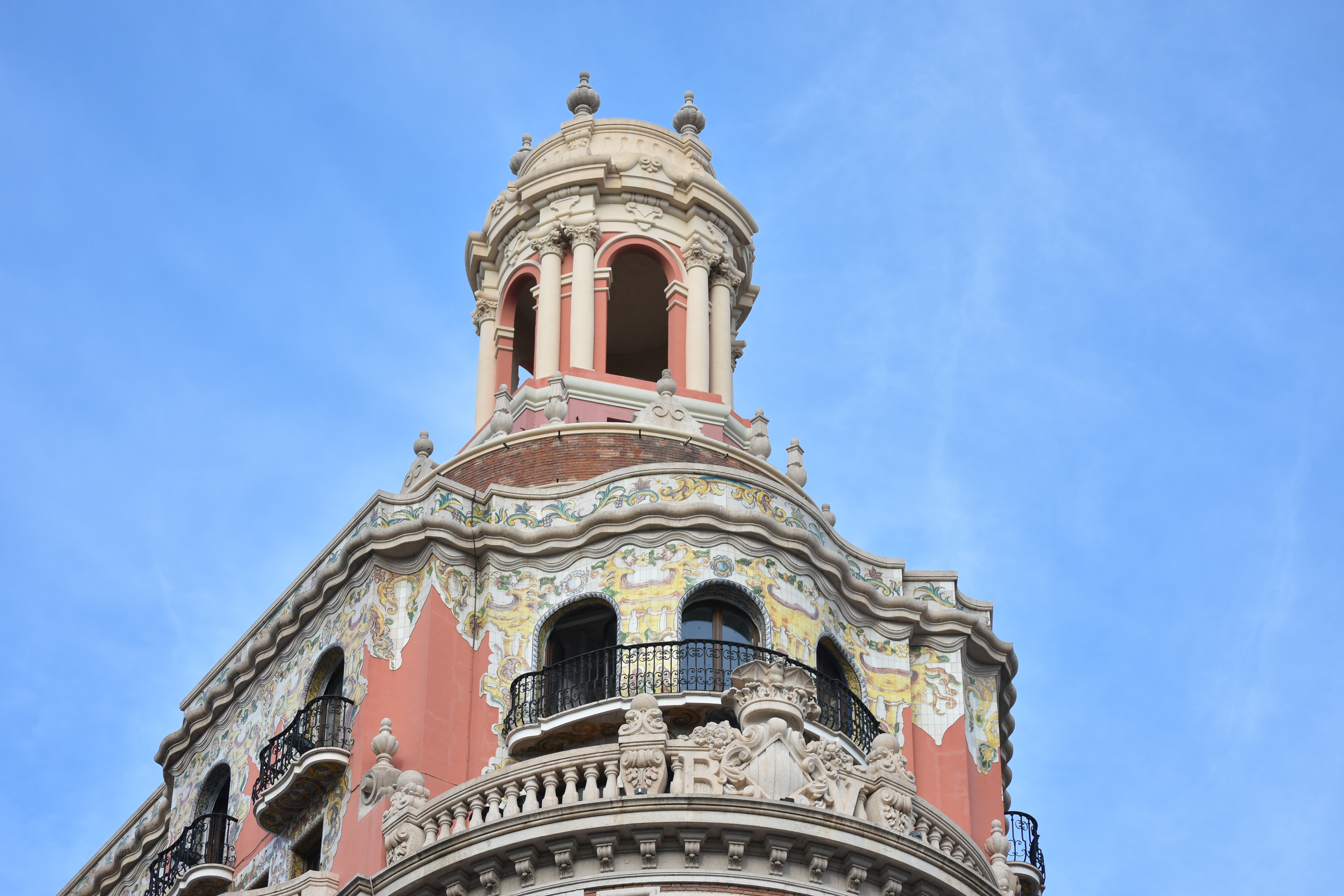 Edificio del Banco de Valencia (Valencia).